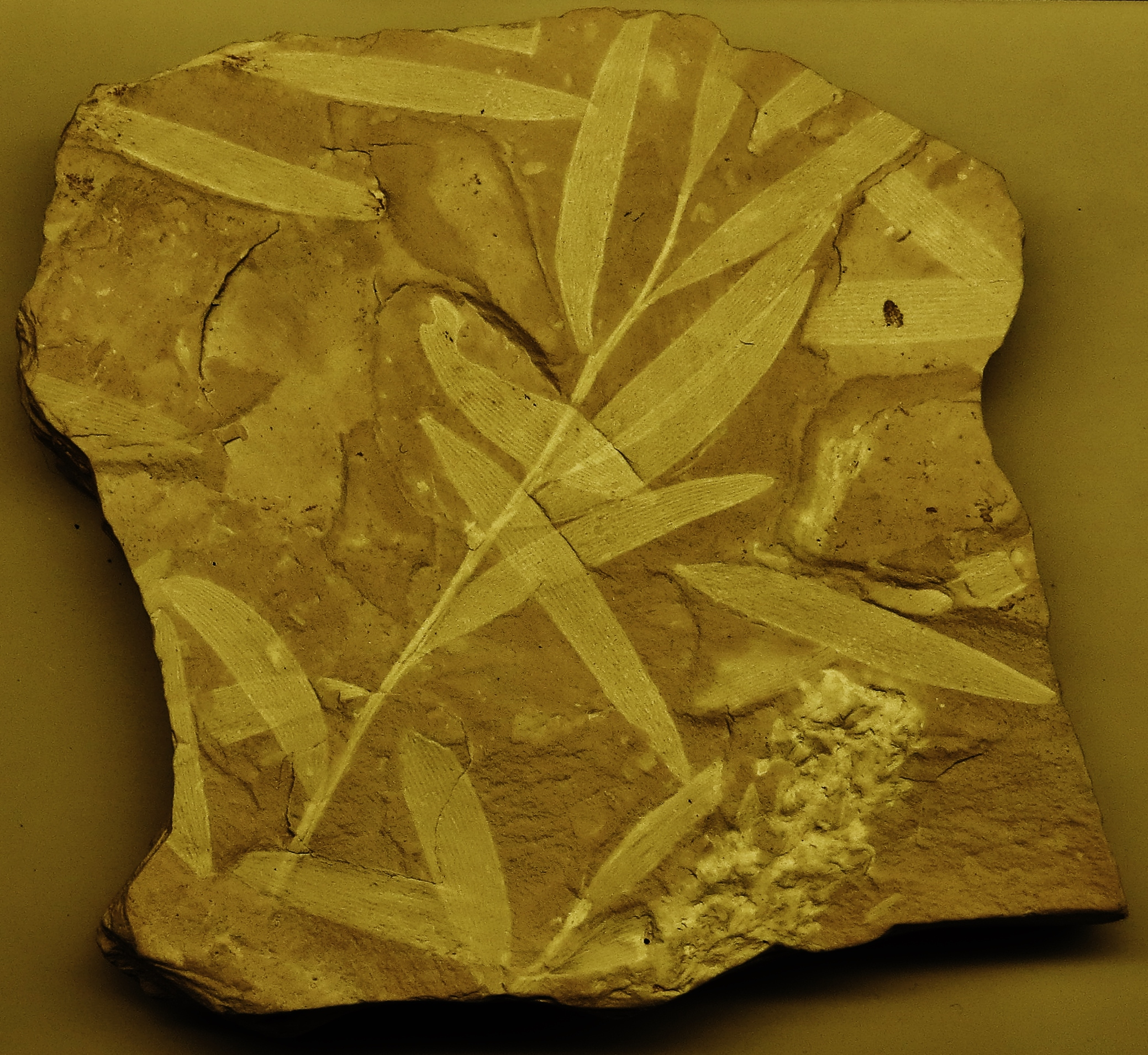 Took the picture at Jura-Museum, Eichstaett